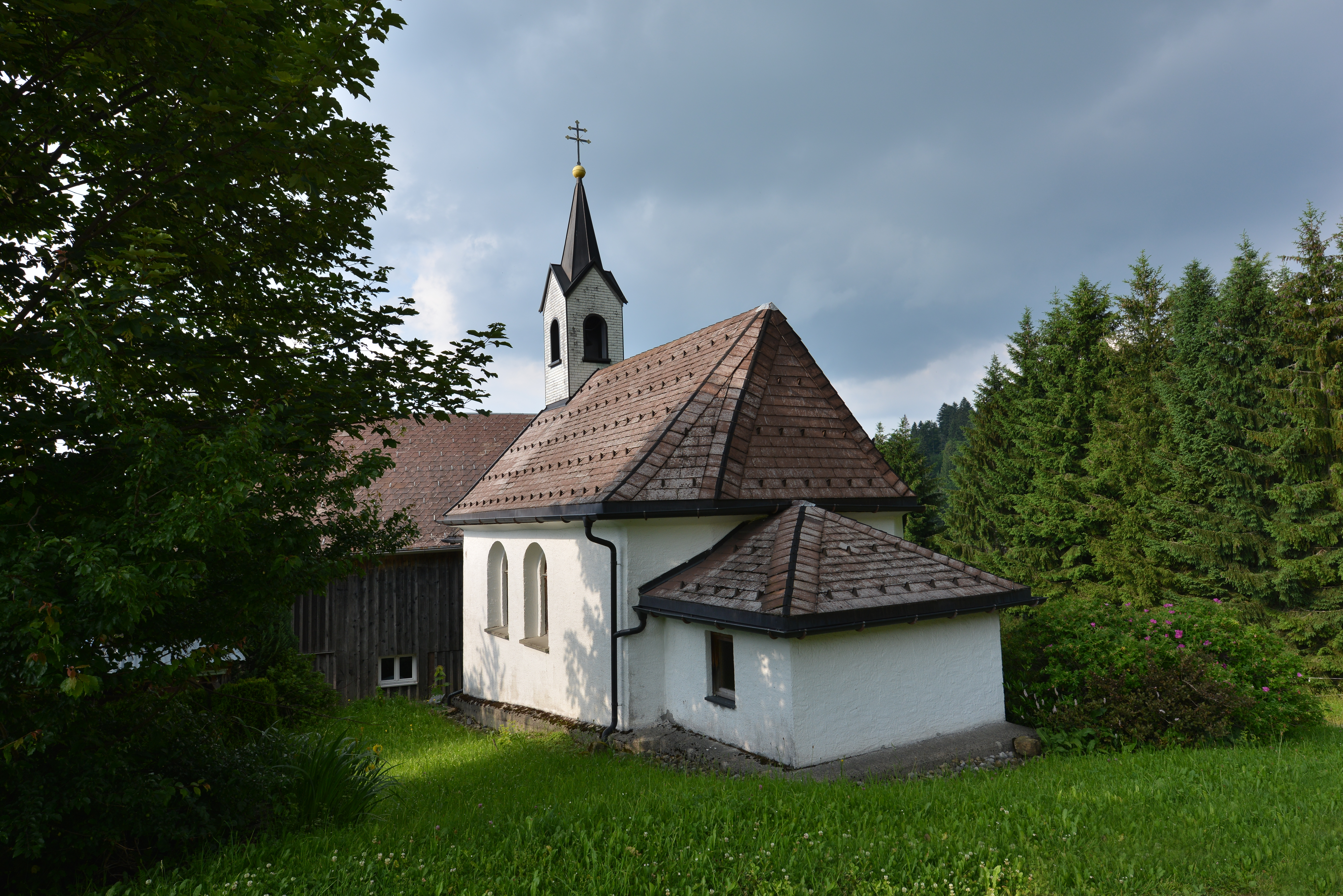 Die Lourdeskapelle Maltach ist eine kleine Kapelle im Ortsteil Maltach der Bregenzerwälder Gemeinde Schwarzenberg. Ein eingeschränkter Fahrweg führt über das Dorfzentrum von Alberschwende.